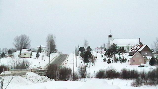 Pont et village de Sainte-Gertrude-Manneville